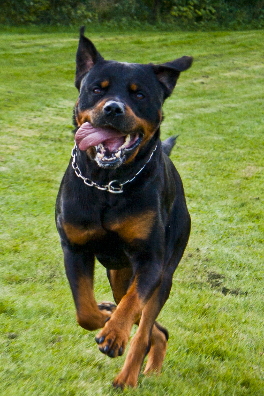 Rottweiler dog